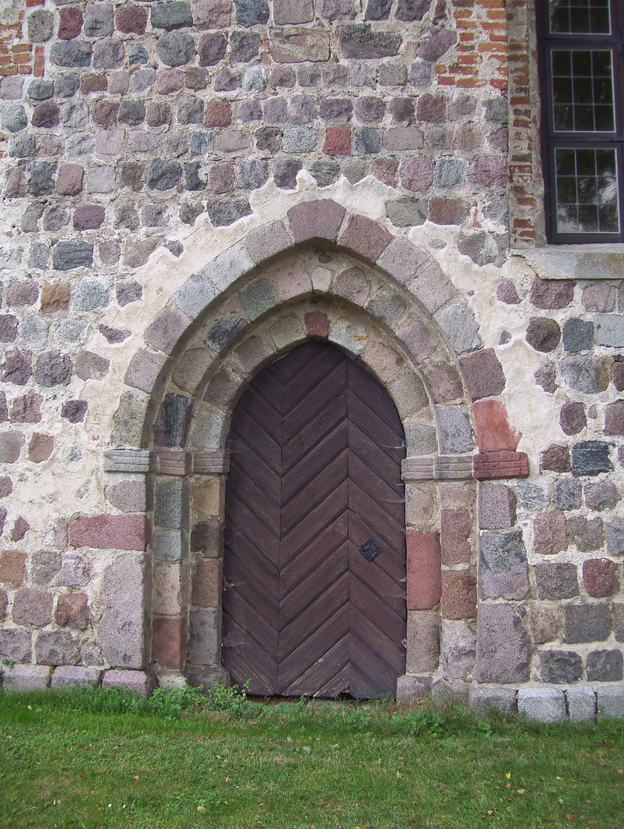 Kirche in Brohm, Friedland (Mecklenburg), westliches Portal an der Südseite